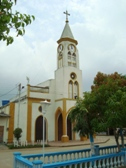 Nuestro mayor icono